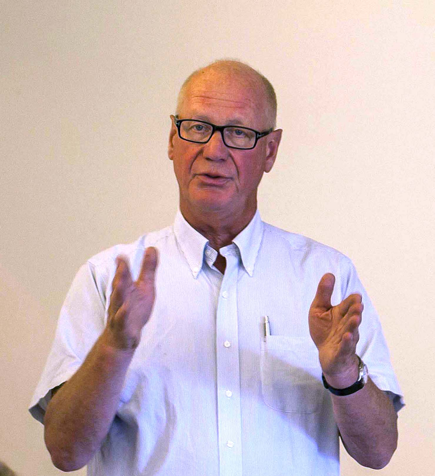 Trond Bakkevig